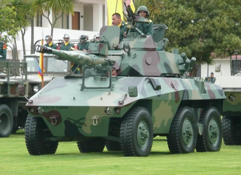 EE-009 Cascavel del Ejercito colombiano